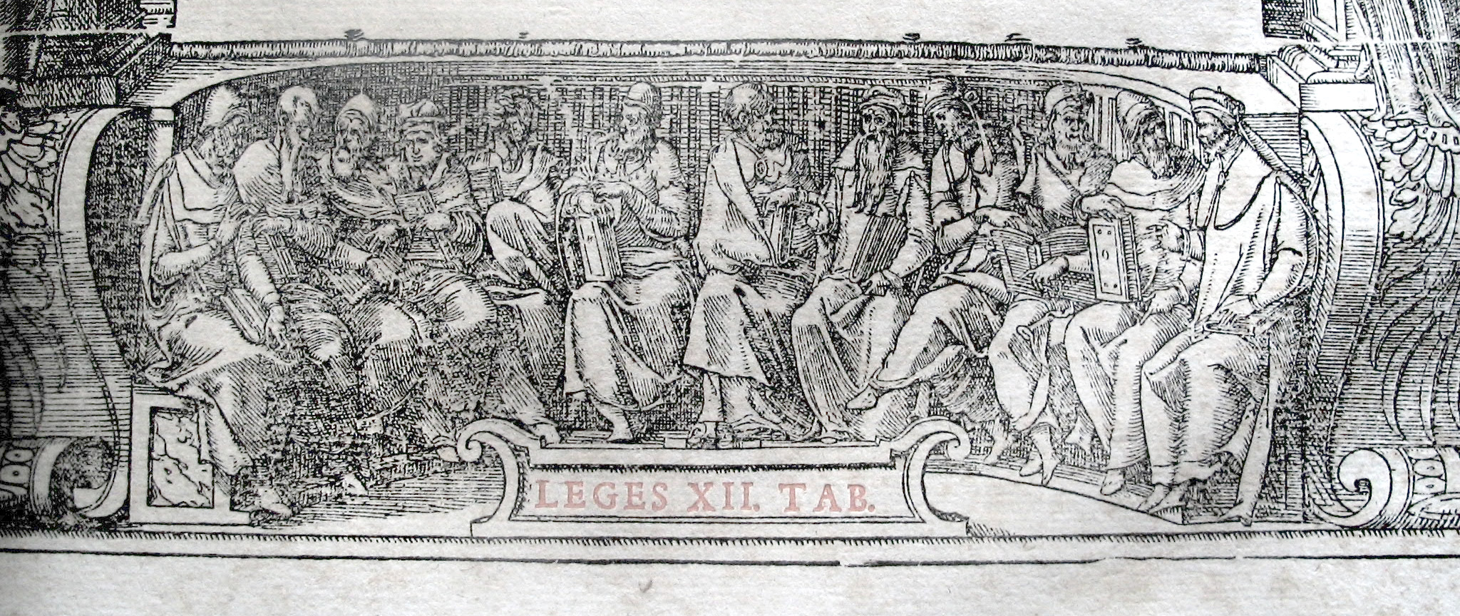 Alegoría de las doce tablas de la ley en un libro de derecho del siglo XVI.